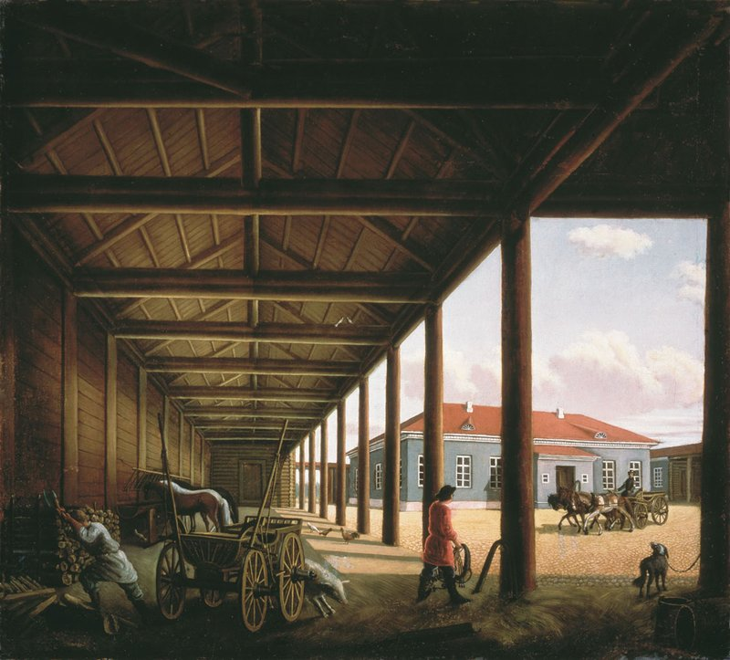 Почтовая станция Холст, масло. 57 x 62 см Тверская областная картинная галерея